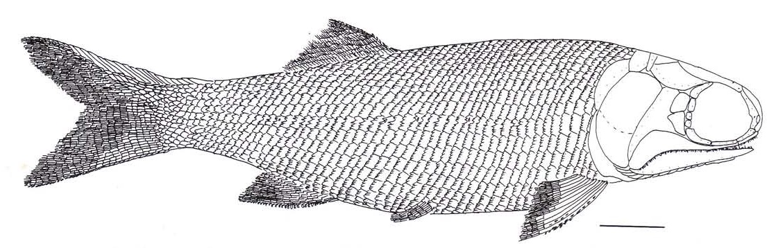 Caelatichthys nitens gen. n., sp. n.. Restoration. Scale bar: 5 mm.